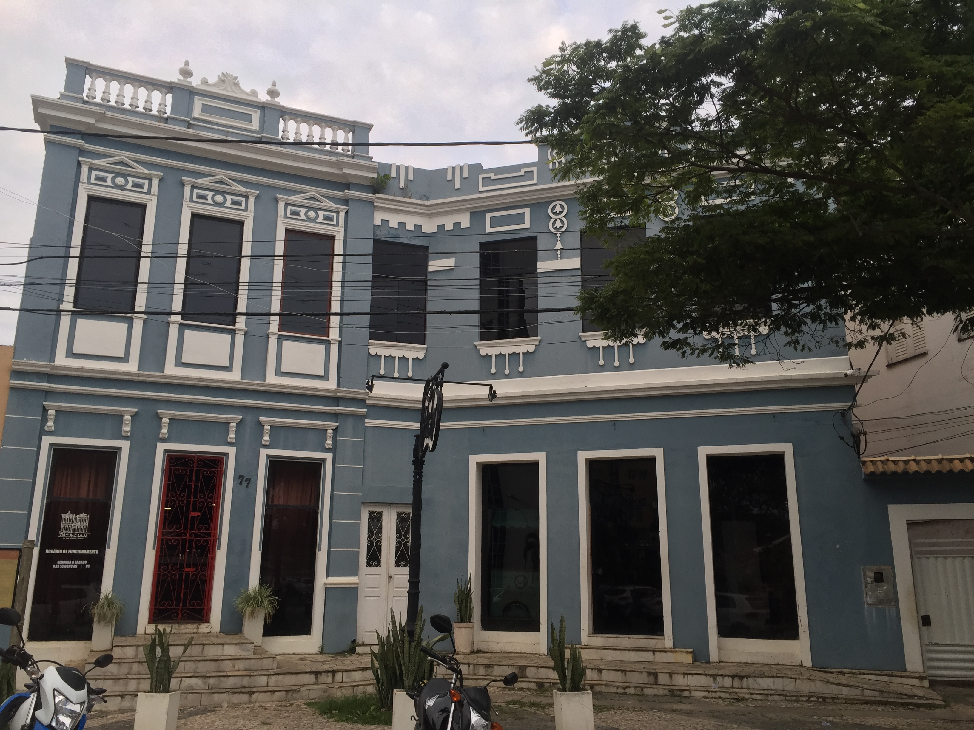 Bataclan, também conhecida como A casa mais charmosa de Ilhéus, que está localizado na Praça José Marcelino, número 77. A casa noturna que funcionava na época com um bordel, construída em 1923, hoje, a casa abriga um restaurante, e oferece espaço para eventos. Curiosidades, o bordel foi imortalizado como um dos cenários do livro Gabriela , e o imóvel, que embora do ponto de vista arquitetônico não tivesse um grande valor, sia principal referência é cultural, sendo assim um dos locais mais visitados por turistas do país, e do exterior, querendo saber o que era realidade e ficção.